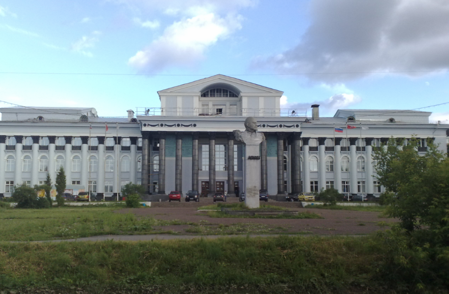 Дворец культуры им. В. И. Ленина (Пермь)